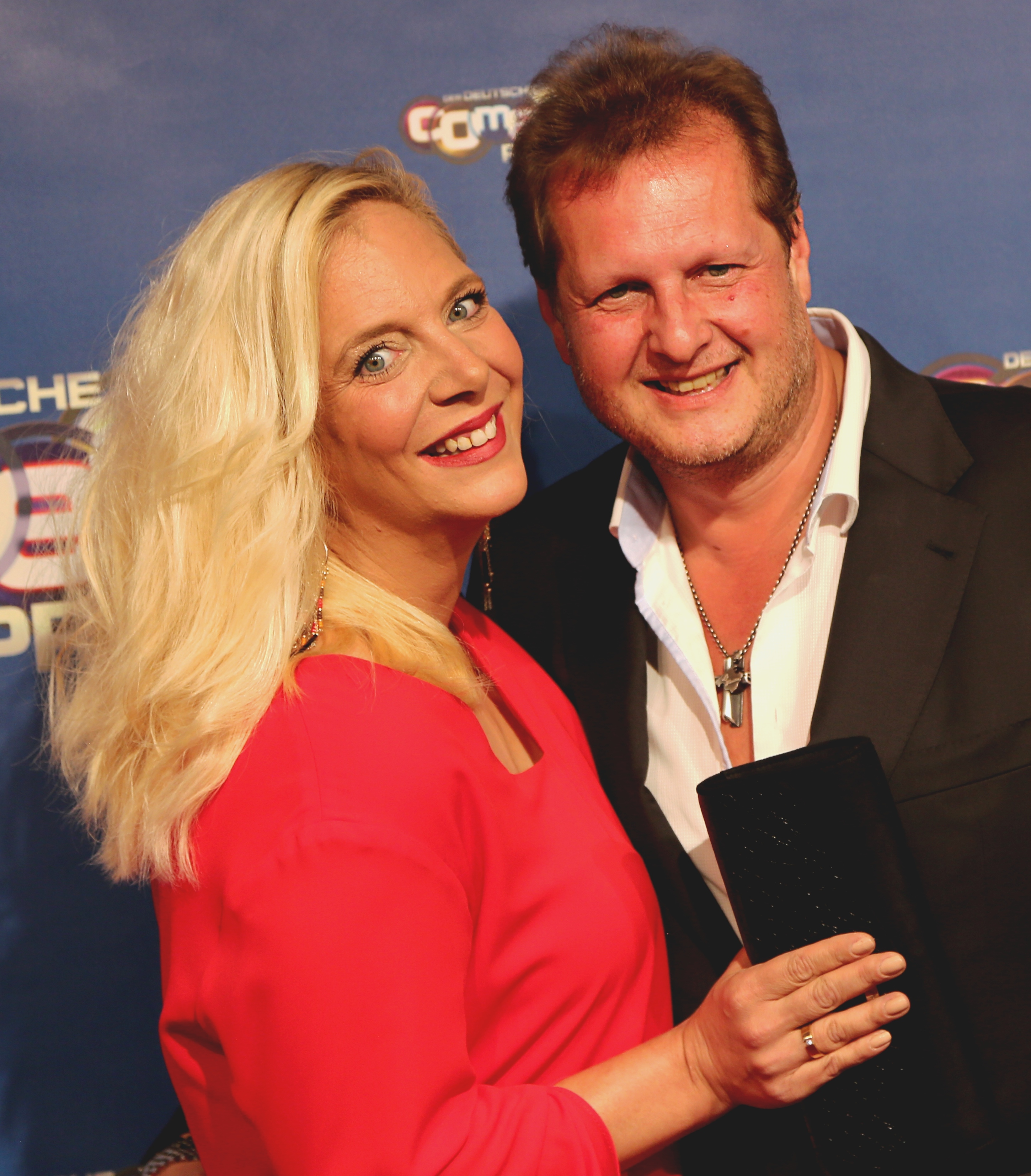 Jens Büchner mit seiner Frau Dani beim Deutschen Comedypreis 2017.